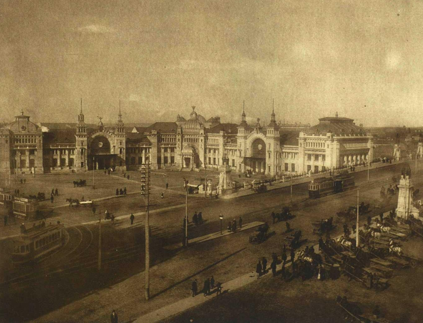 Брестский вокзал, Москва, Российская Империя.